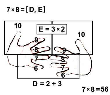 Умножение "на пальцах" 7x8=56, (учебная игра)